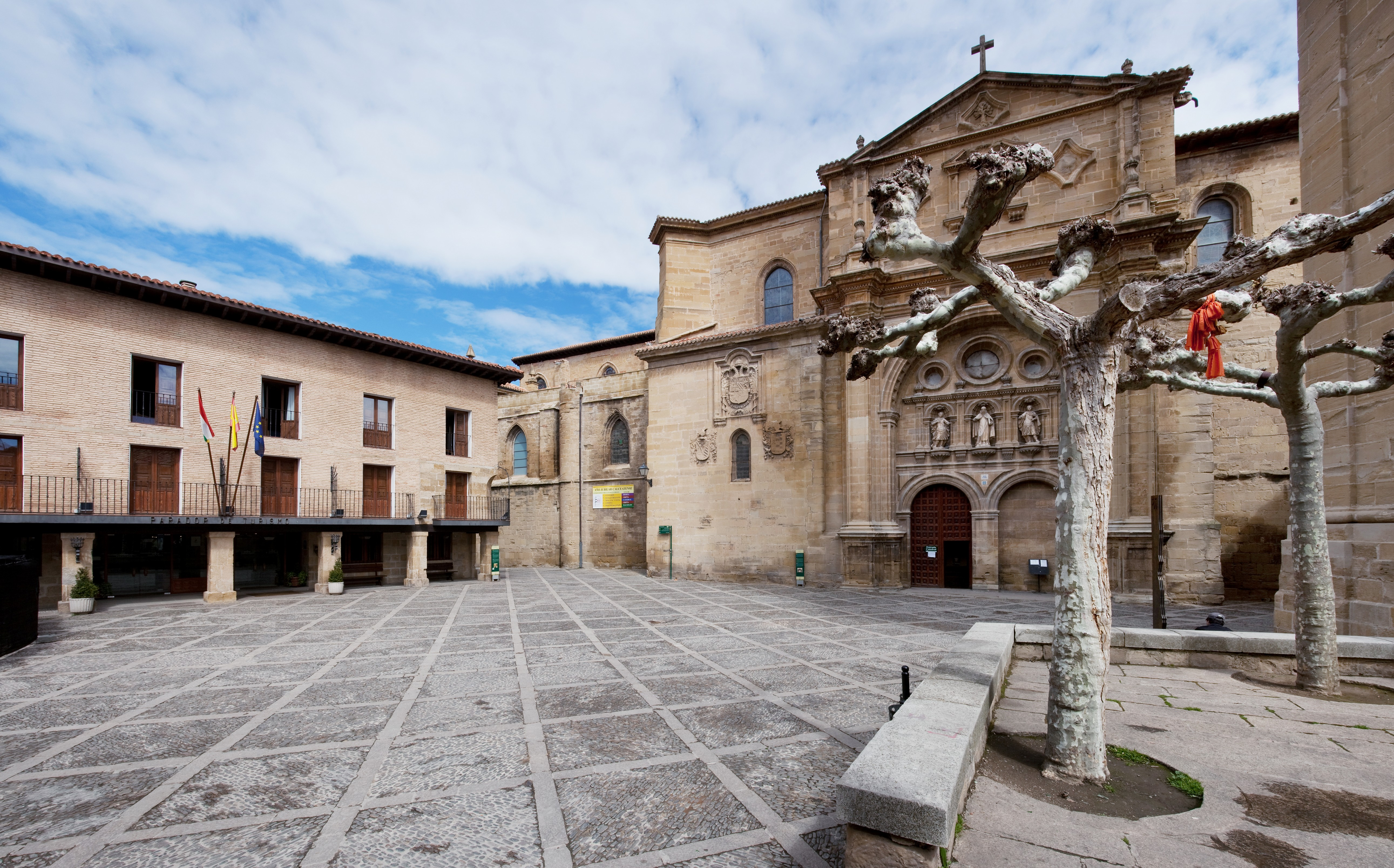 Parador de Santo Domingo de la Calzada